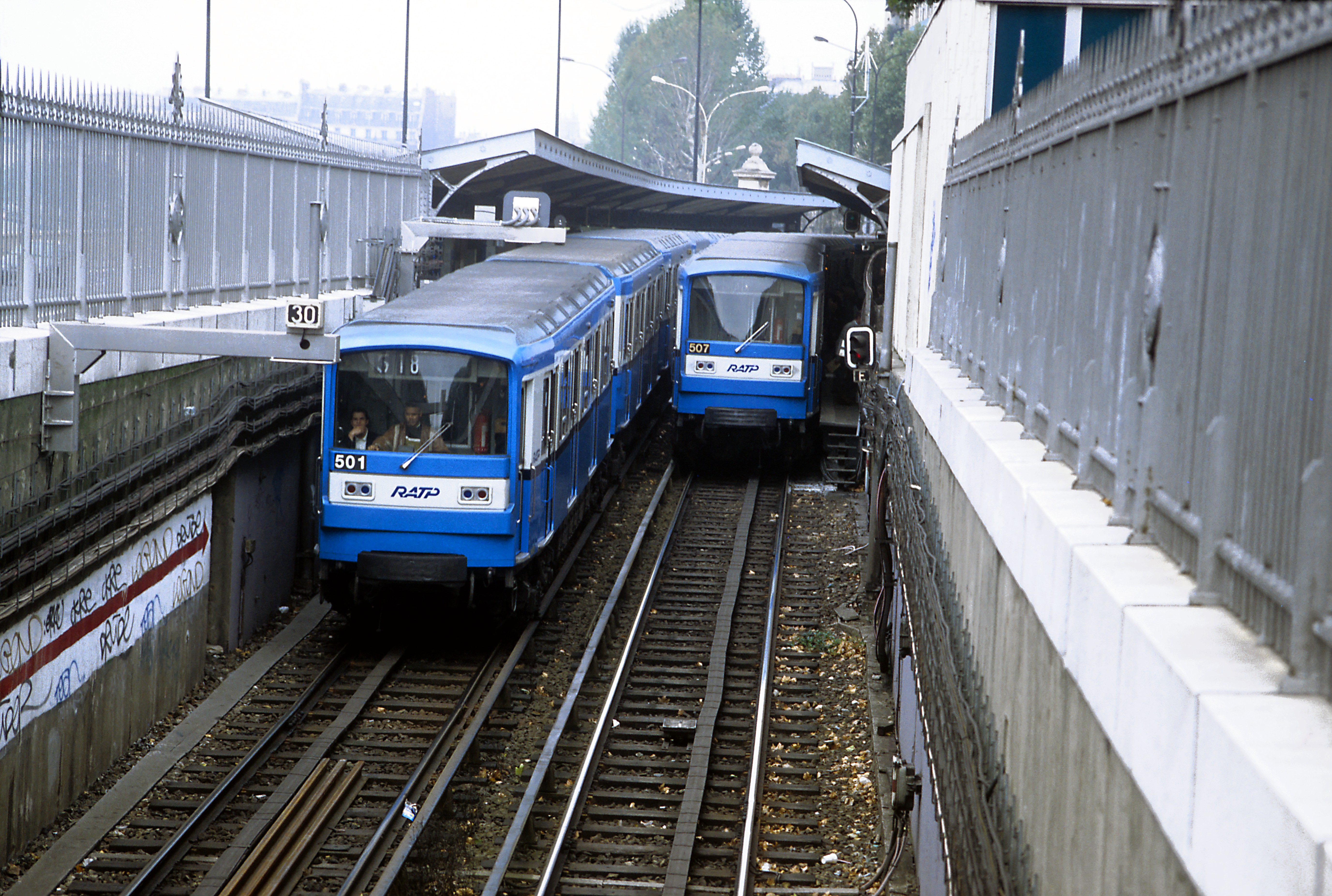 Zug der Reihe MF 67 auf der Linie 5 Richtung Place d’Italie vor dem Viaduc d’Austerlitz, nächster Halt Bf Paris-Austerlitz.